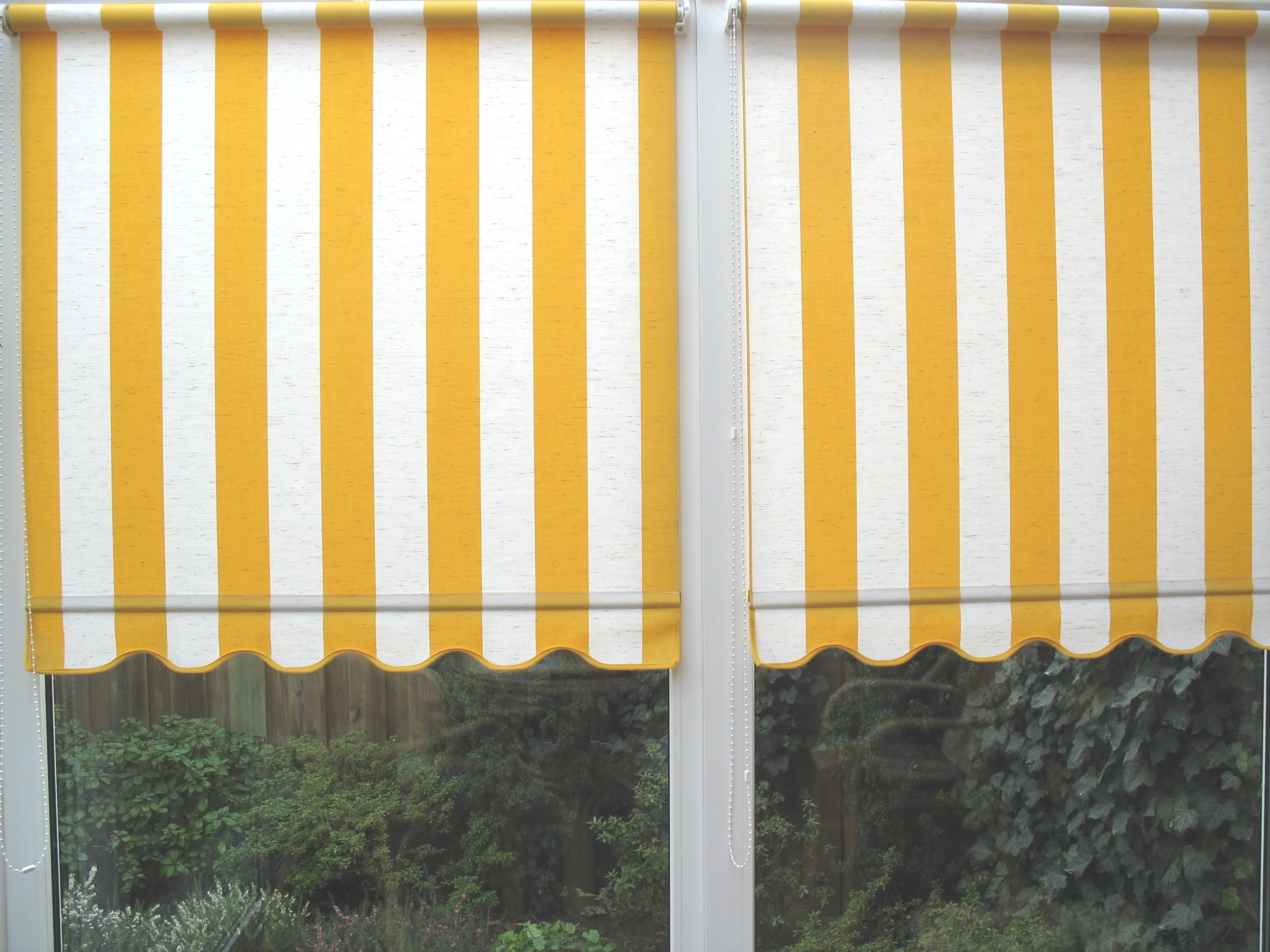 Rollo aus PAN